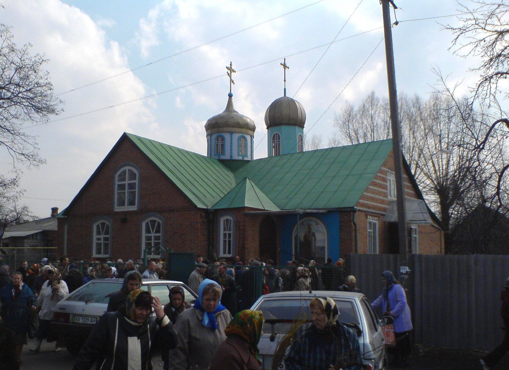 Храм Николая в Люботине, Харьковская область